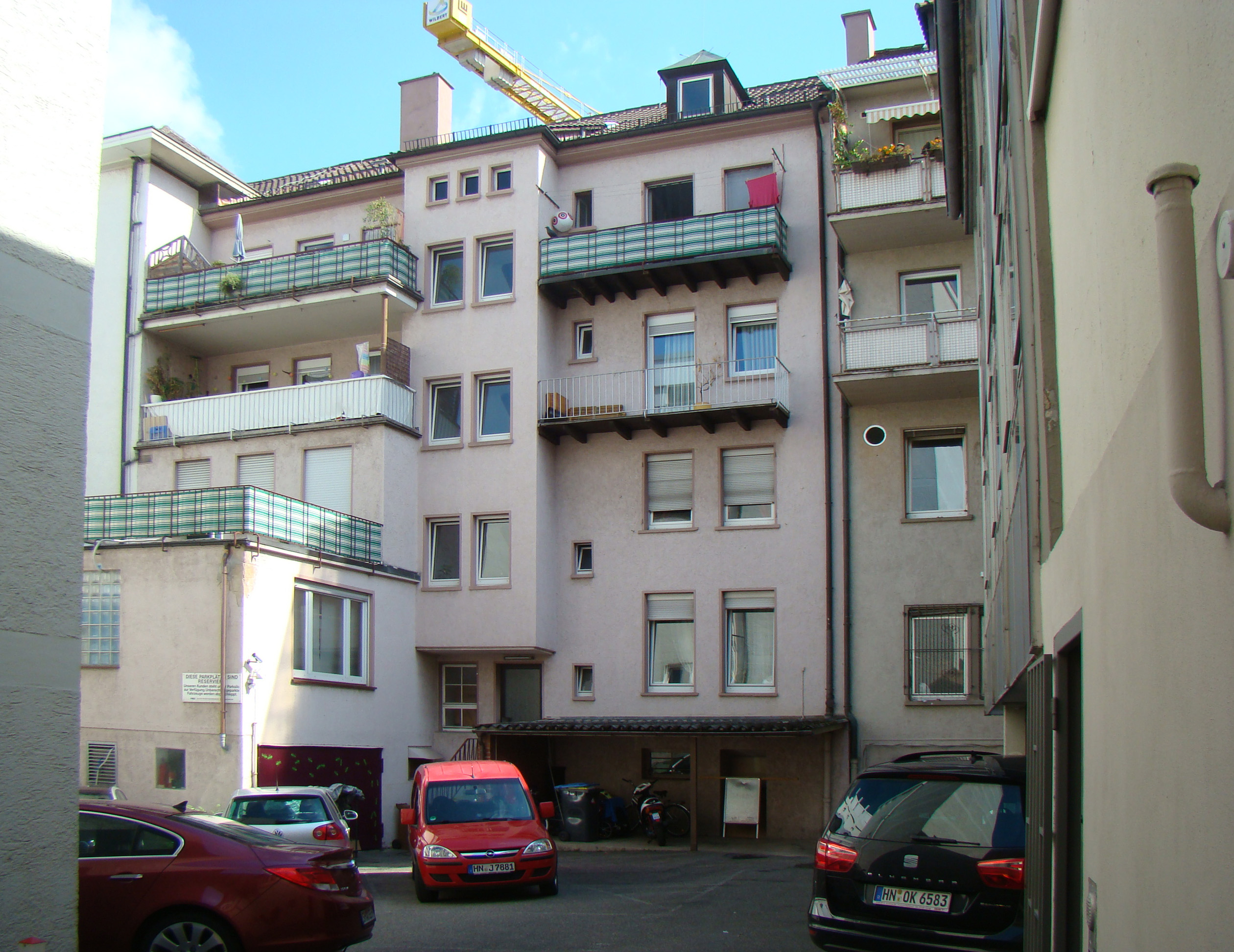 Innenhof mit Architektur der 50er Jahre in der Innenstadt von Heilbronn